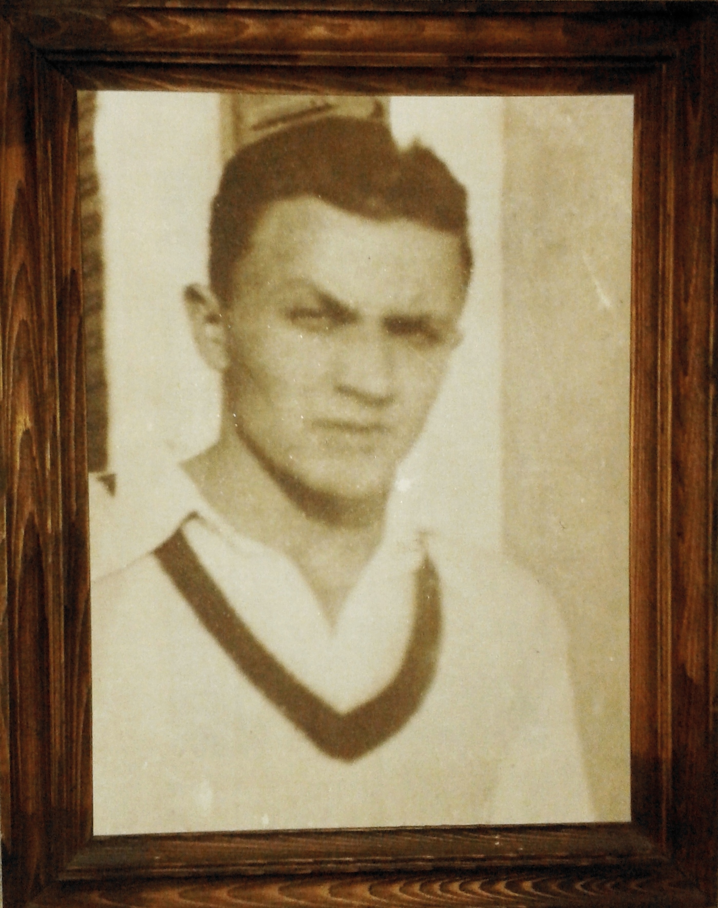 Фотографија Жикице Јовановића Шпанца из сталне поставке Музеја 7. јули 1941. у Белој Црви, код Крупња.